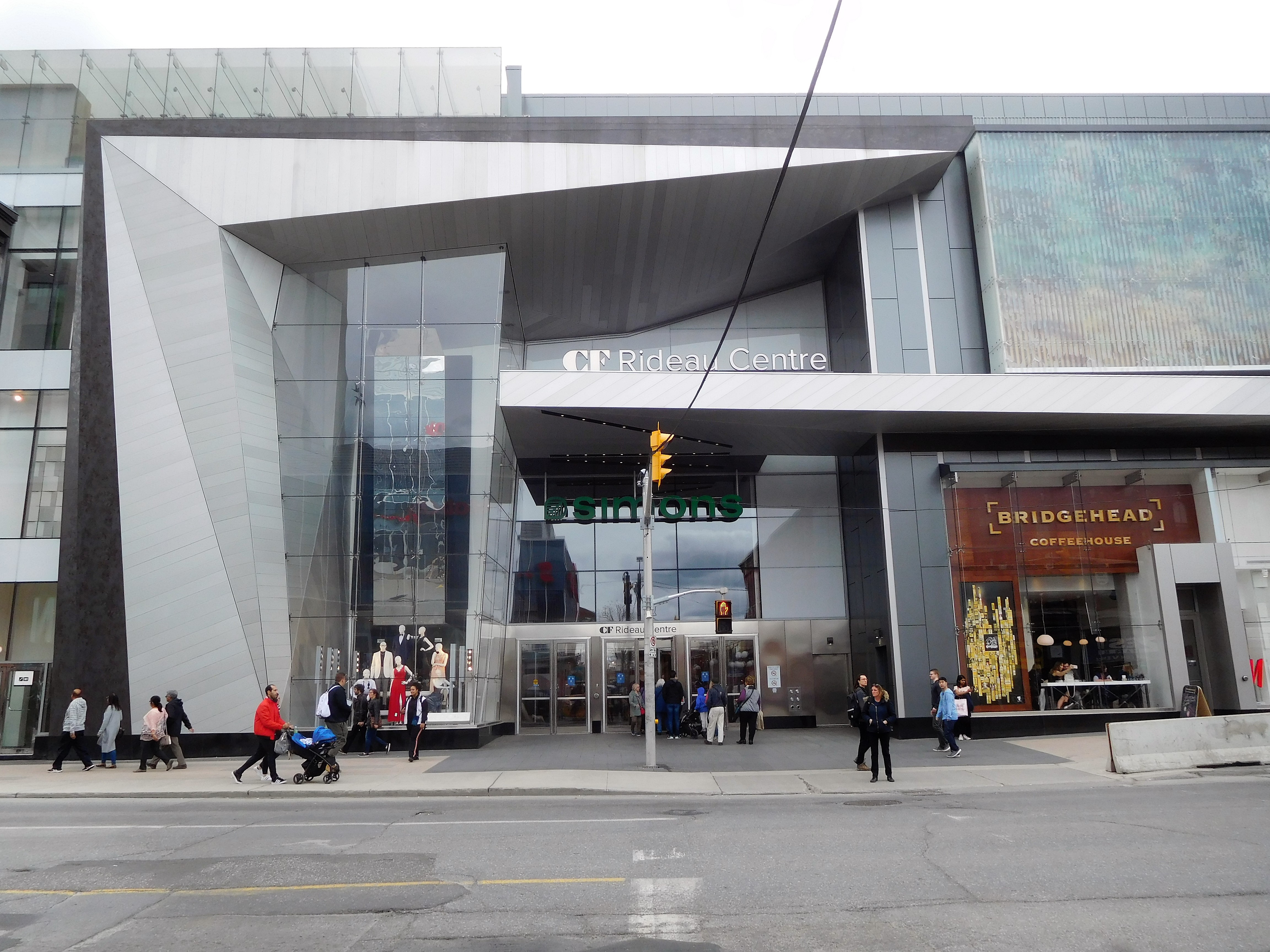 Centre Rideau, 50, rue Rideau, Ottawa